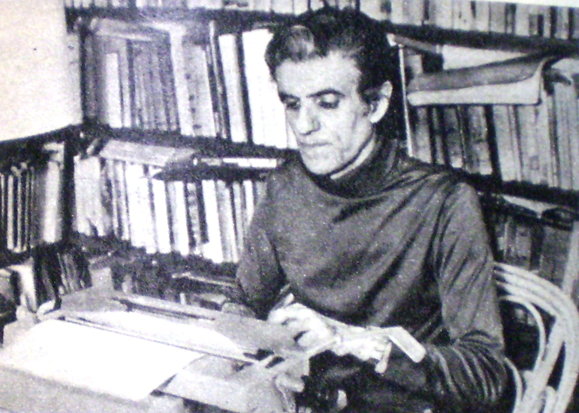 Juan José Sebreli